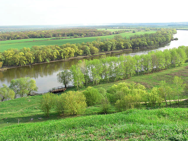 р.Дон. с.Урыв-Покровка